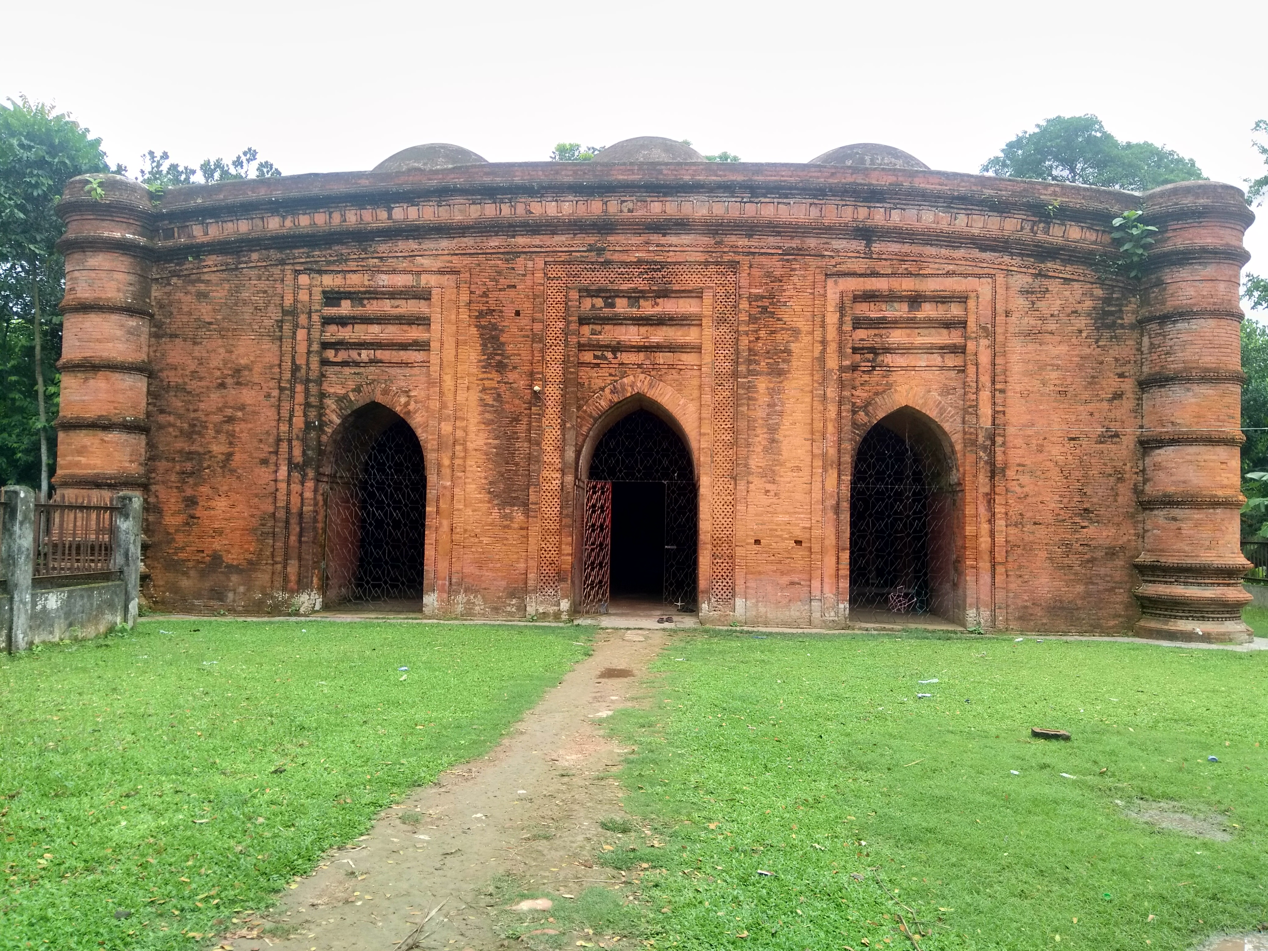 নয়গম্বুজ মসজিদ